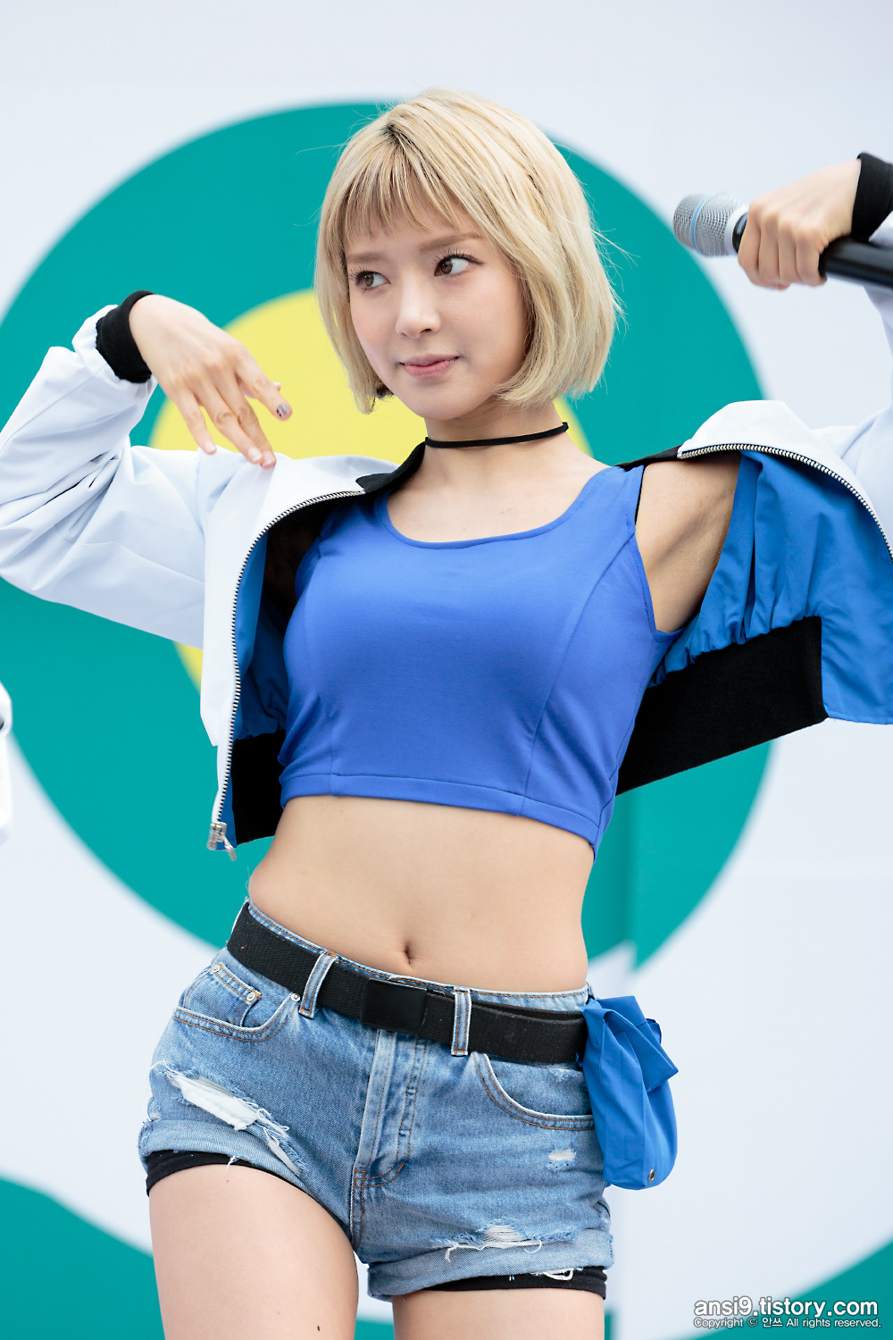 16.10.01 한돈데이 AOA 초아 (5)